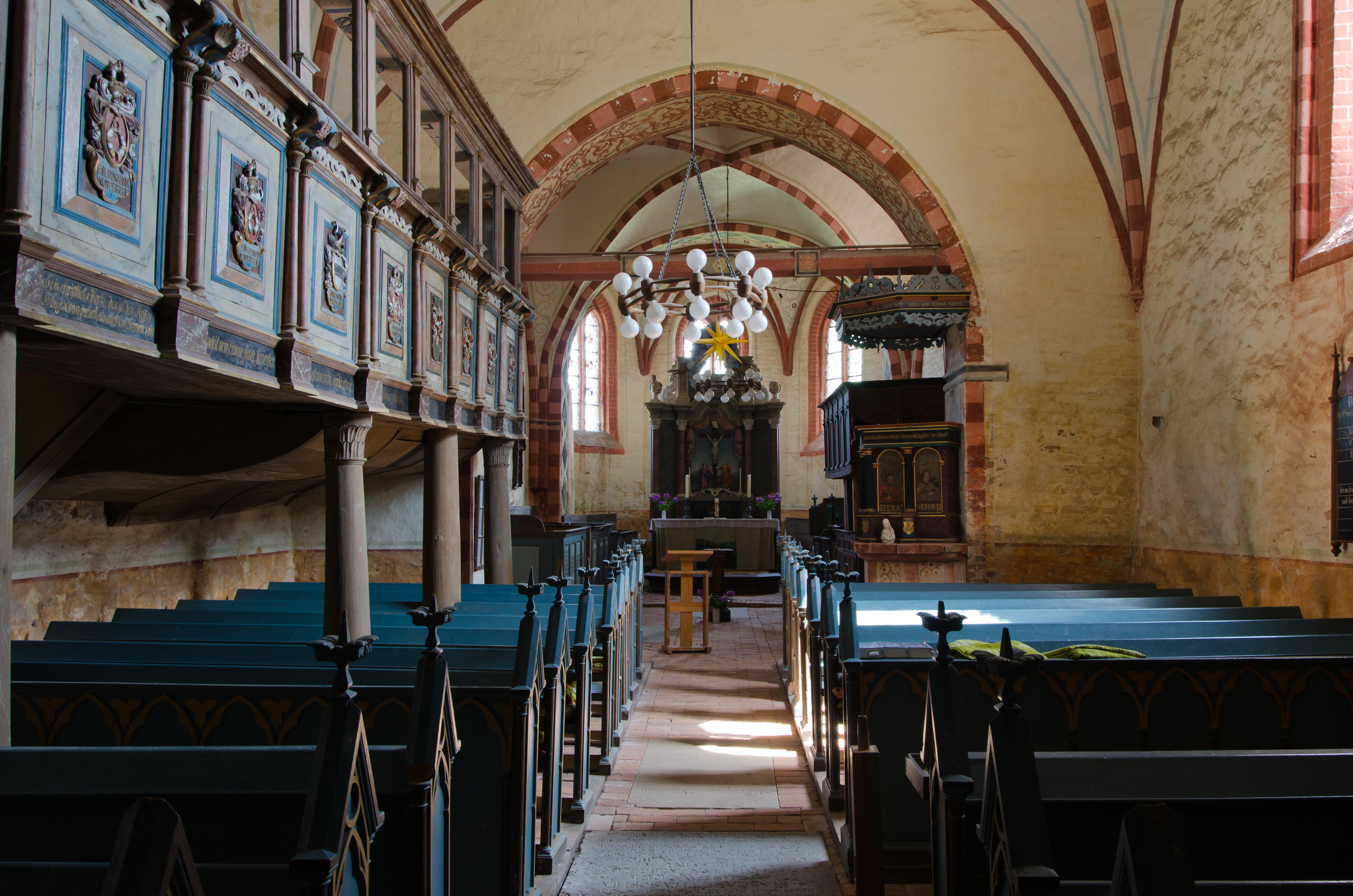 Hanstorf Kirche Blick Richtung Altar